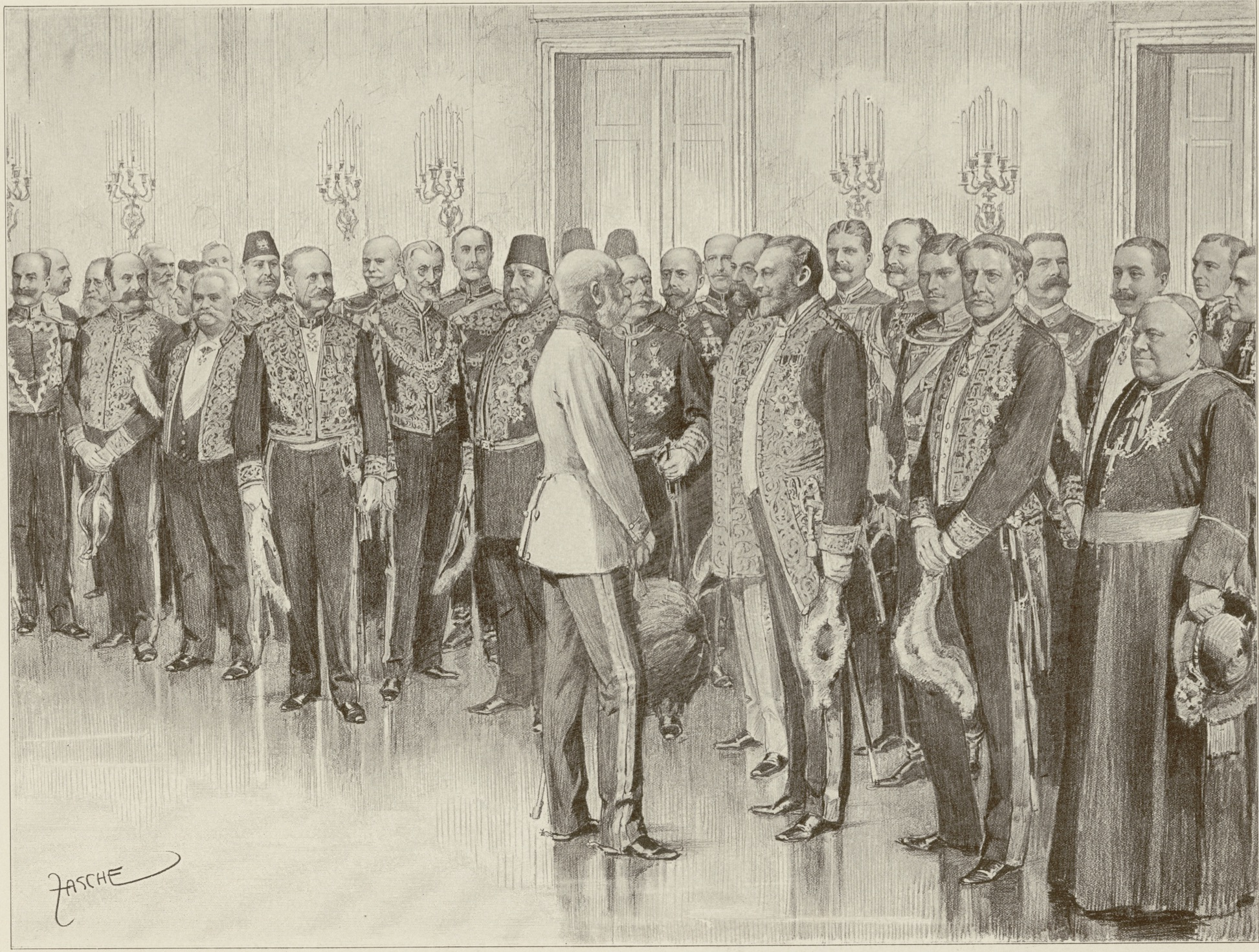 veröffentlicht und abgebildet im Kaiserjubiläumswerk "Viribus Unitis", Wien 1898, S. 45.